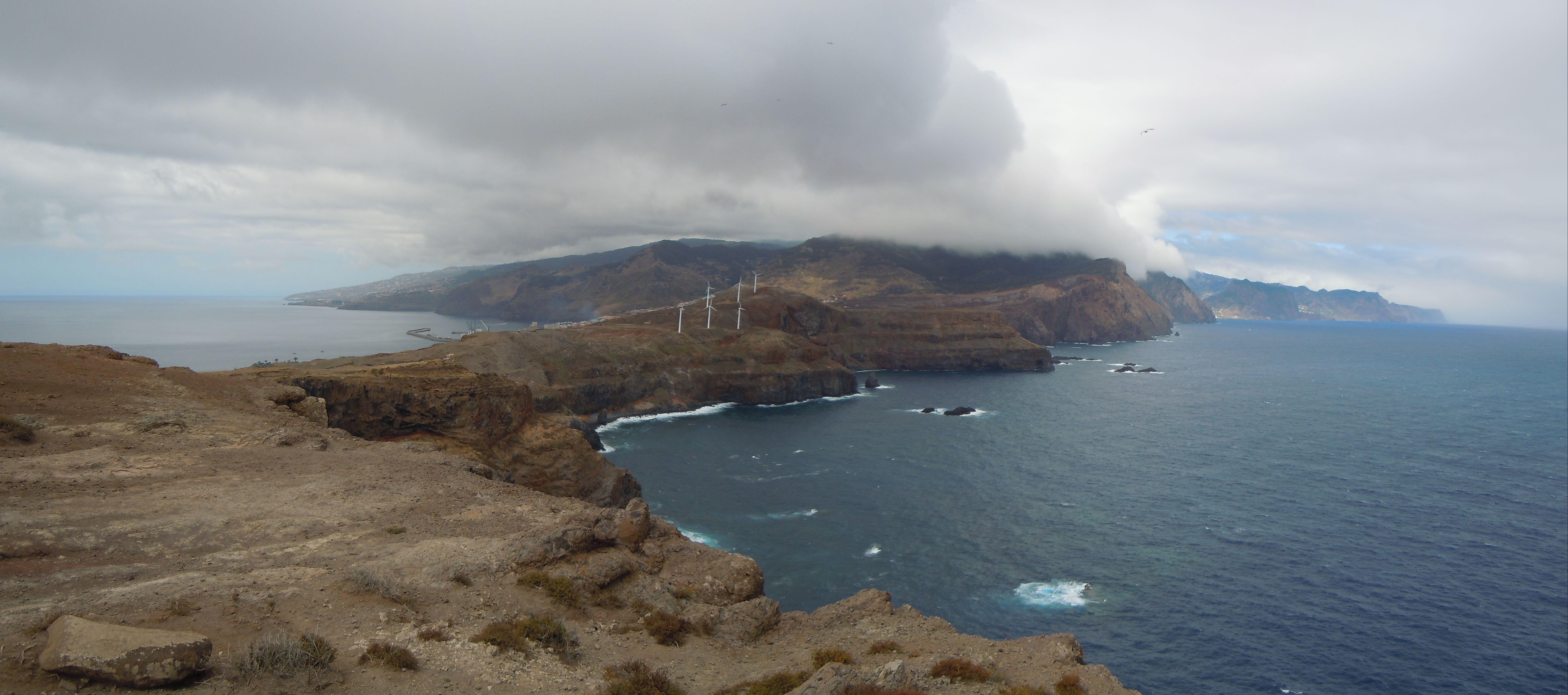 Baixas do Guincho